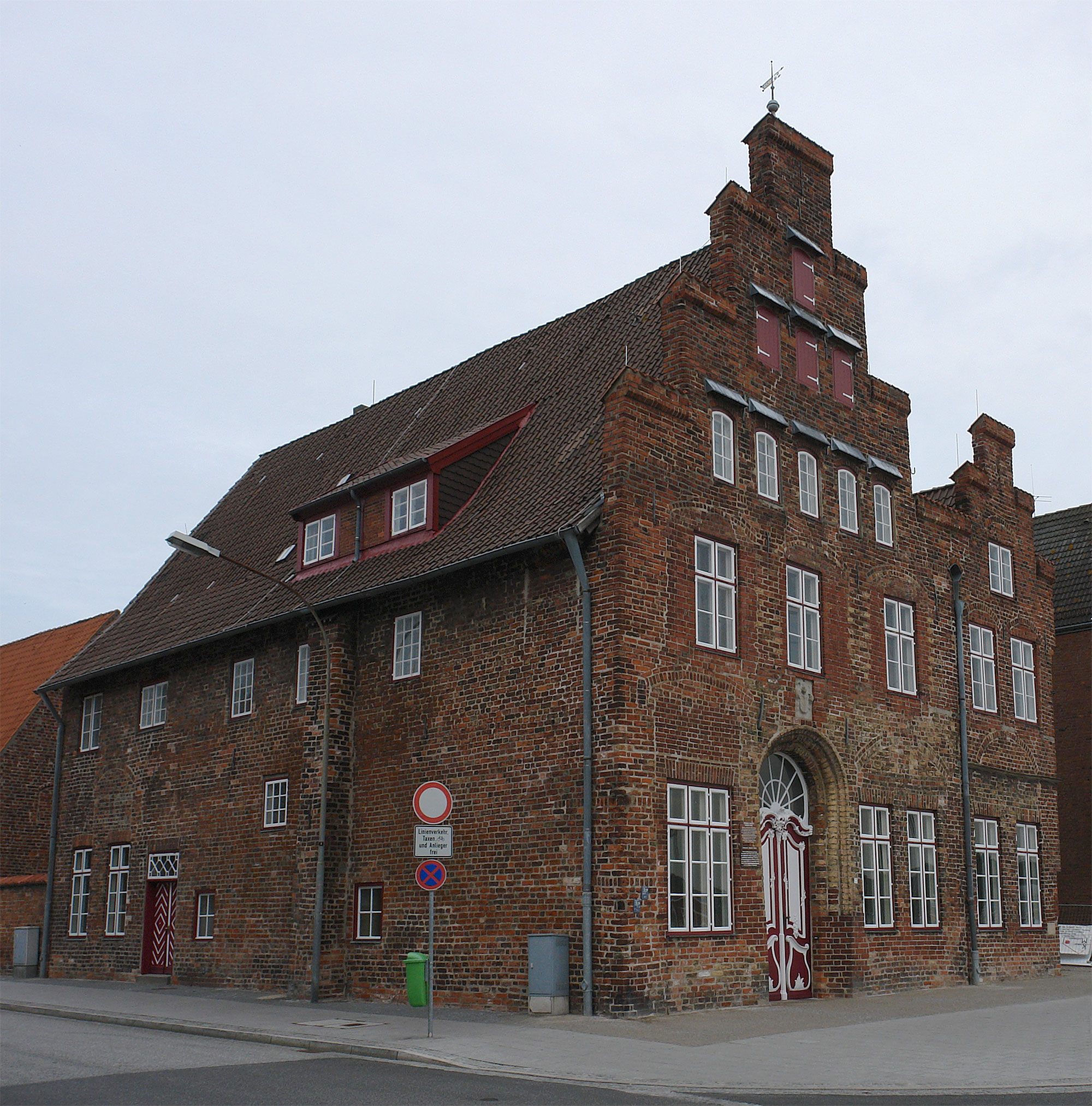 Travemünde: Ehemalige Lübische Vogtei, vermutlich 2.Hälfte 16.Jh. Nach Brand in Formen der Renaissance um 1600 neu errichtet. Eines der ältesten Wohnhäuser Travemündes